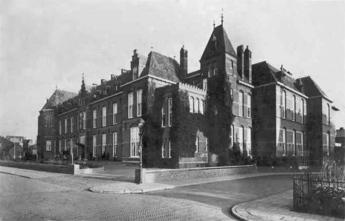 Foto van het Sint Antonius Ziekenhuis uit de 1900-1910 uit eigen archief, overgenomen met volledige toestemming van de directie van het ziekenhuis.